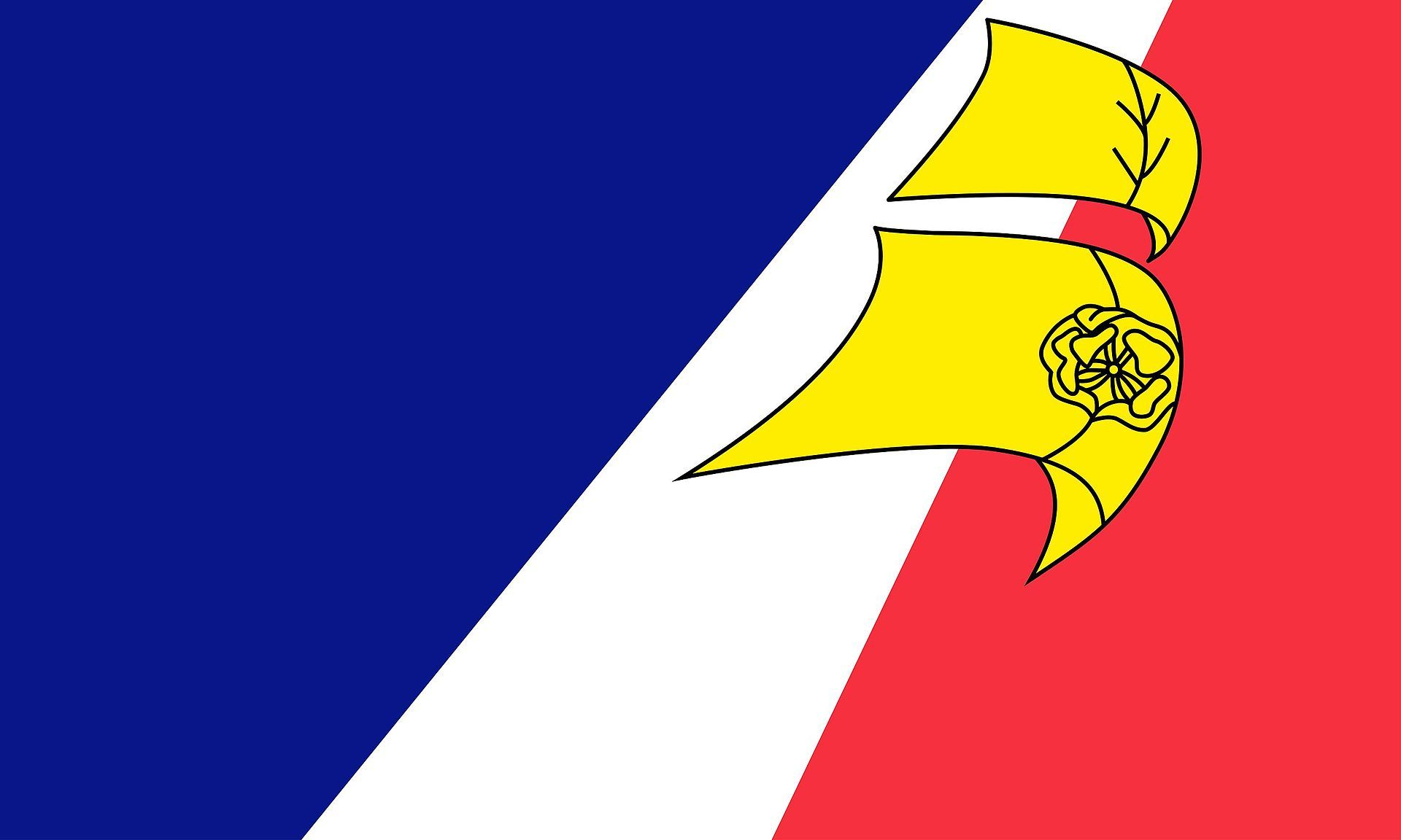 Drapeau des francophones et Acadiens de Terre-Neuve-et-Labrador (Canada). Copyrights : Fédération des francophones de Terre-Neuve et du Labrador (FFTNL)